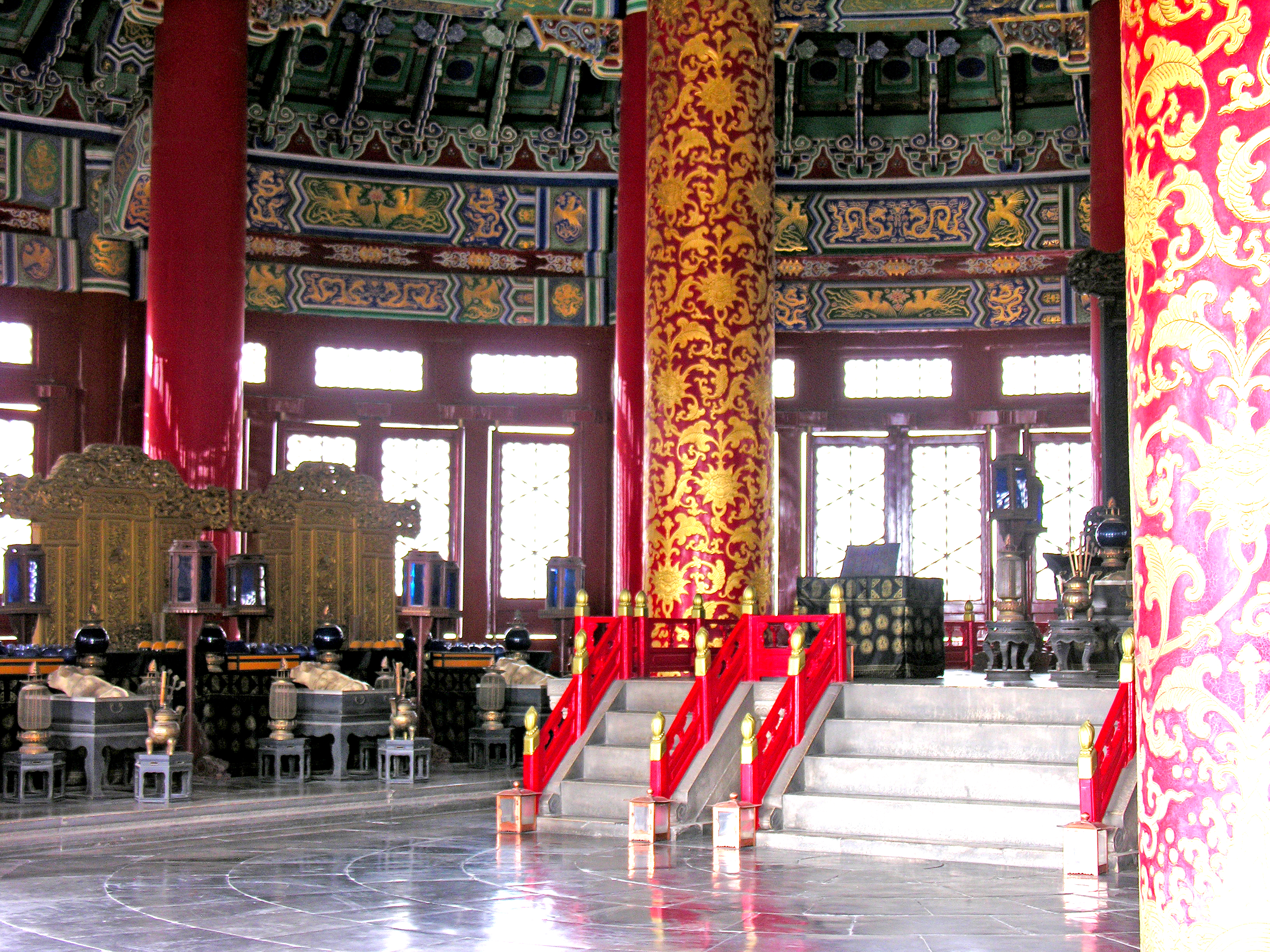 China-6944